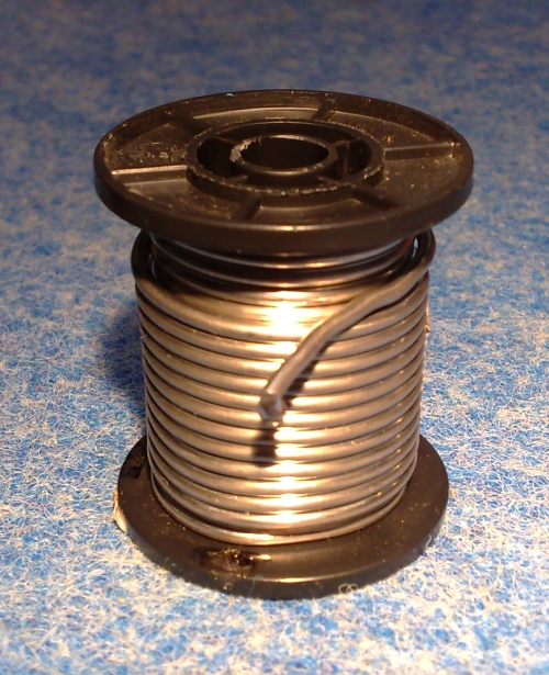 Cínoolověná pájka